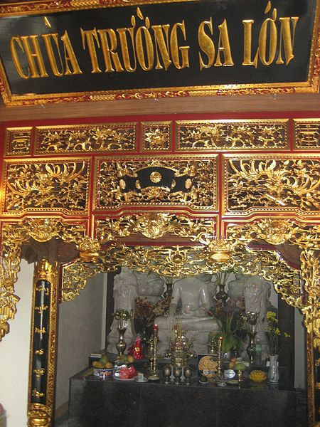 Buddhistická pagoda na Spratlyho ostrově